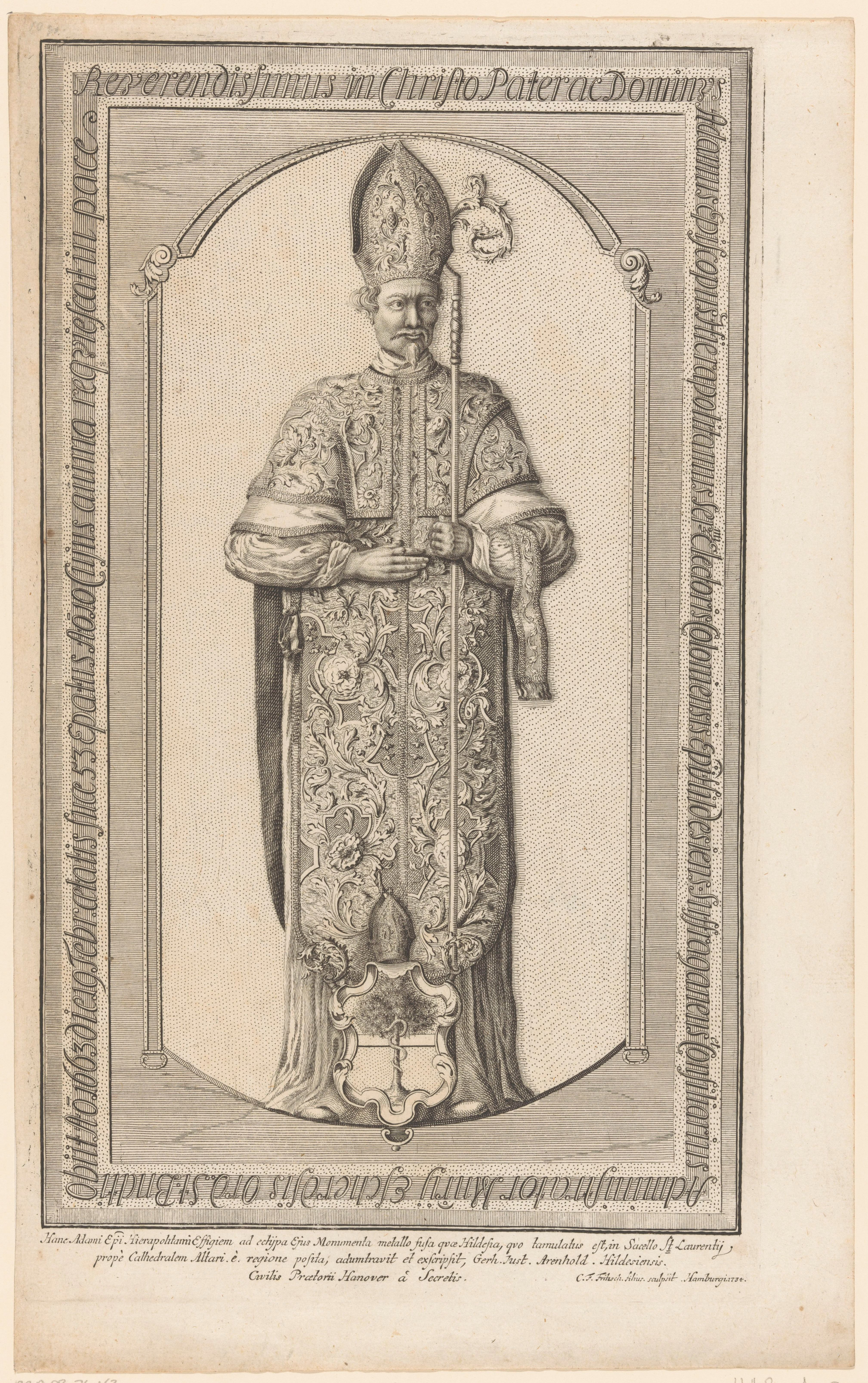 IdentificatieTitel(s): Portret van Adam AdamiObjecttype: prent Objectnummer: RP-P-OB-76.163Catalogusreferentie: HAB A 47Drugulin 43Omschrijving: Portret van Adam Adami in een rechthoekige omlijsting met randschrift. Midden onder een wapen met een slang in een boom en een mijter. In de ondermarge drie regels Latijnse tekst.VervaardigingVervaardiger: prentmaker: Christian Friedrich Fritzsch (vermeld op object)naar ontwerp van: Gerhard Justus Arenhold (vermeld op object)Plaats vervaardiging: HamburgDatering: 1734Fysieke kenmerken: gravureMateriaal: papier Techniek: graveren (drukprocedé)Afmetingen: plaatrand: h 332 mm × b 193 mmOnderwerpWie: Adam AdamiVerwerving en rechtenVerwerving: onbekend 1997Copyright: Publiek domein